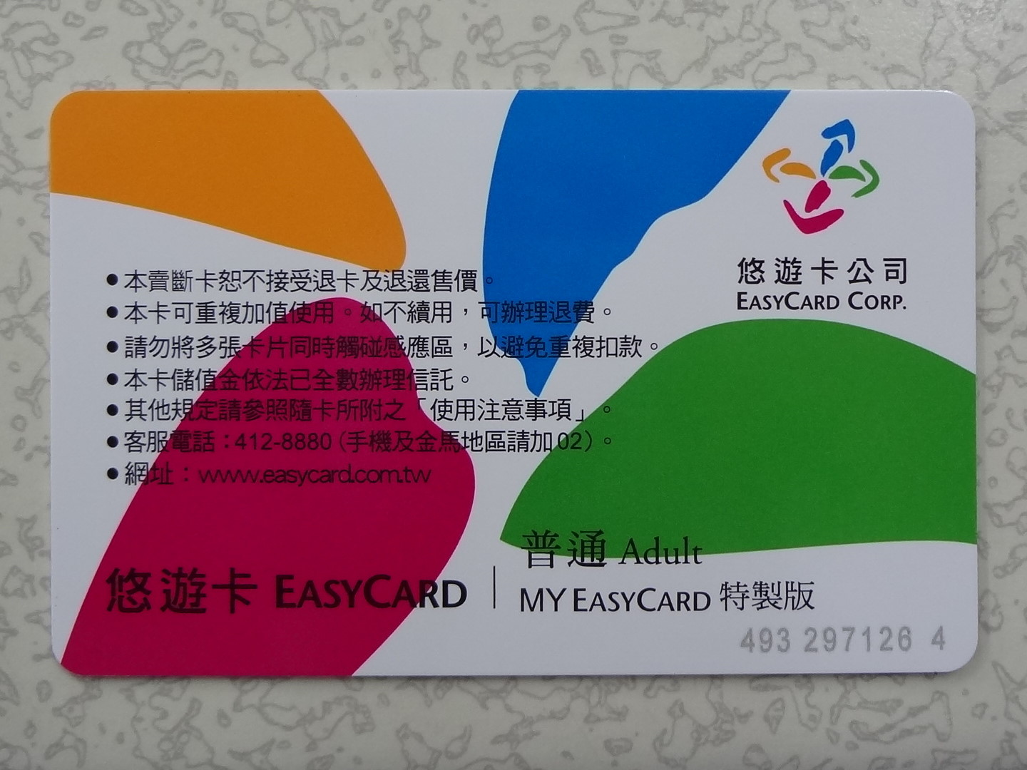 中文（台灣）: 特製版悠遊卡普通卡背面。